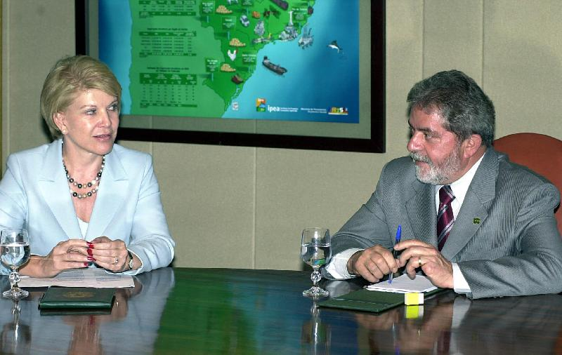 O presidente Luiz Inácio Lula da Silva recebe a prefeita de São Paulo Marta Suplicy no Palácio do Planalto.